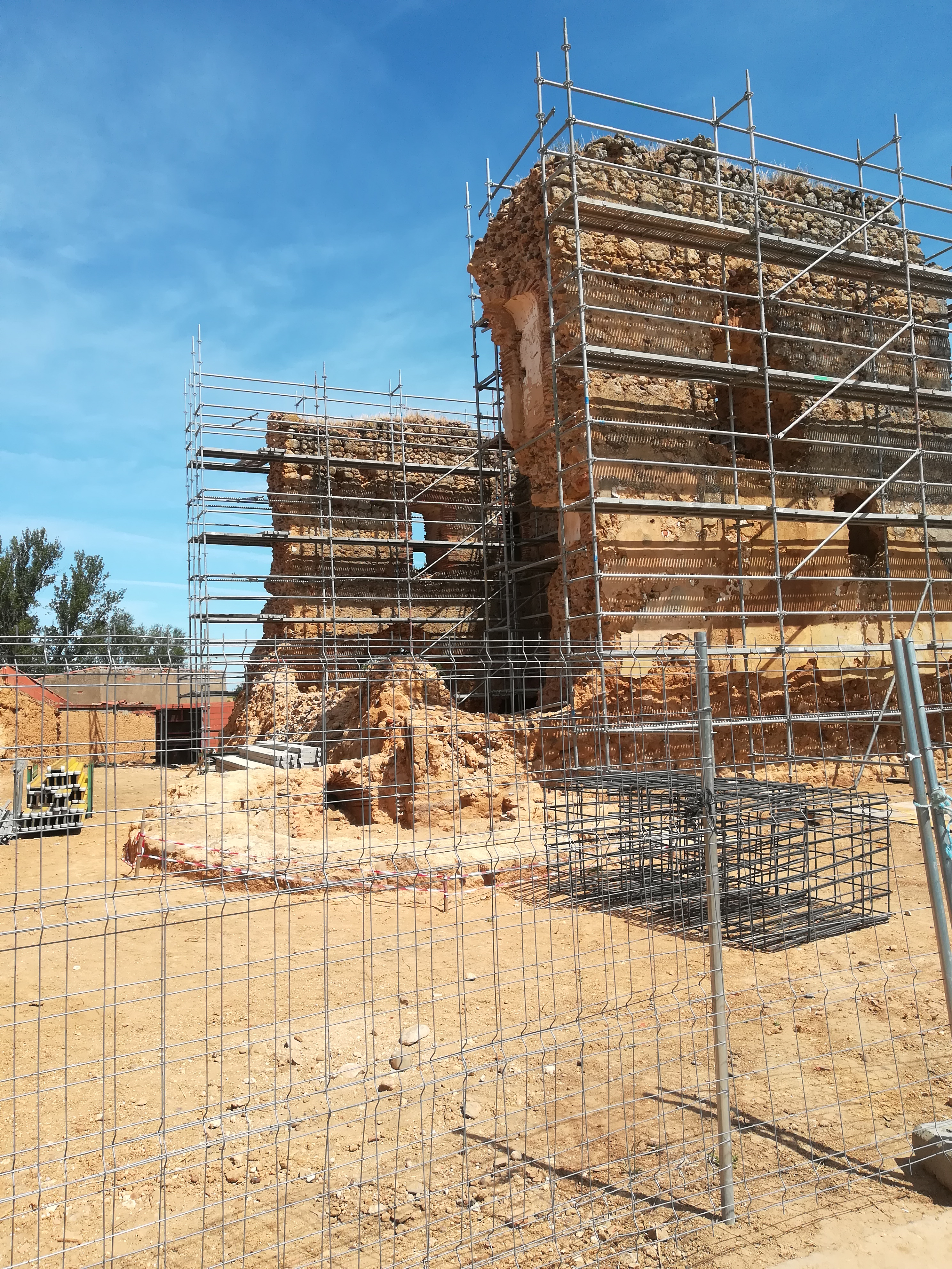 Obras del castillo